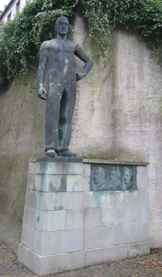 An der Aussenmauer der Schlossanlage Arbon erinnern die in Bronze gegossenen Porträts der Industriellen Franz, Adolph und Hippolyt Saurer sowie die daneben stehende Gestalt eines stämmigen Arbeiters an das einst dominierende Arboner Unternehmen Aktiengesellschaft Adolph Saurer. Erstellt anlässlich des Jubiläums "100 Jahre Saurer" (1953)